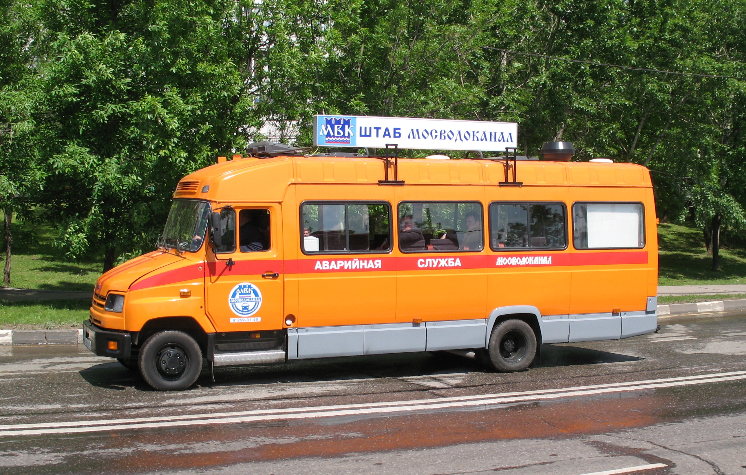 Штабной автобус ЗИЛ-3250АО аварийной службы Мосводоканала